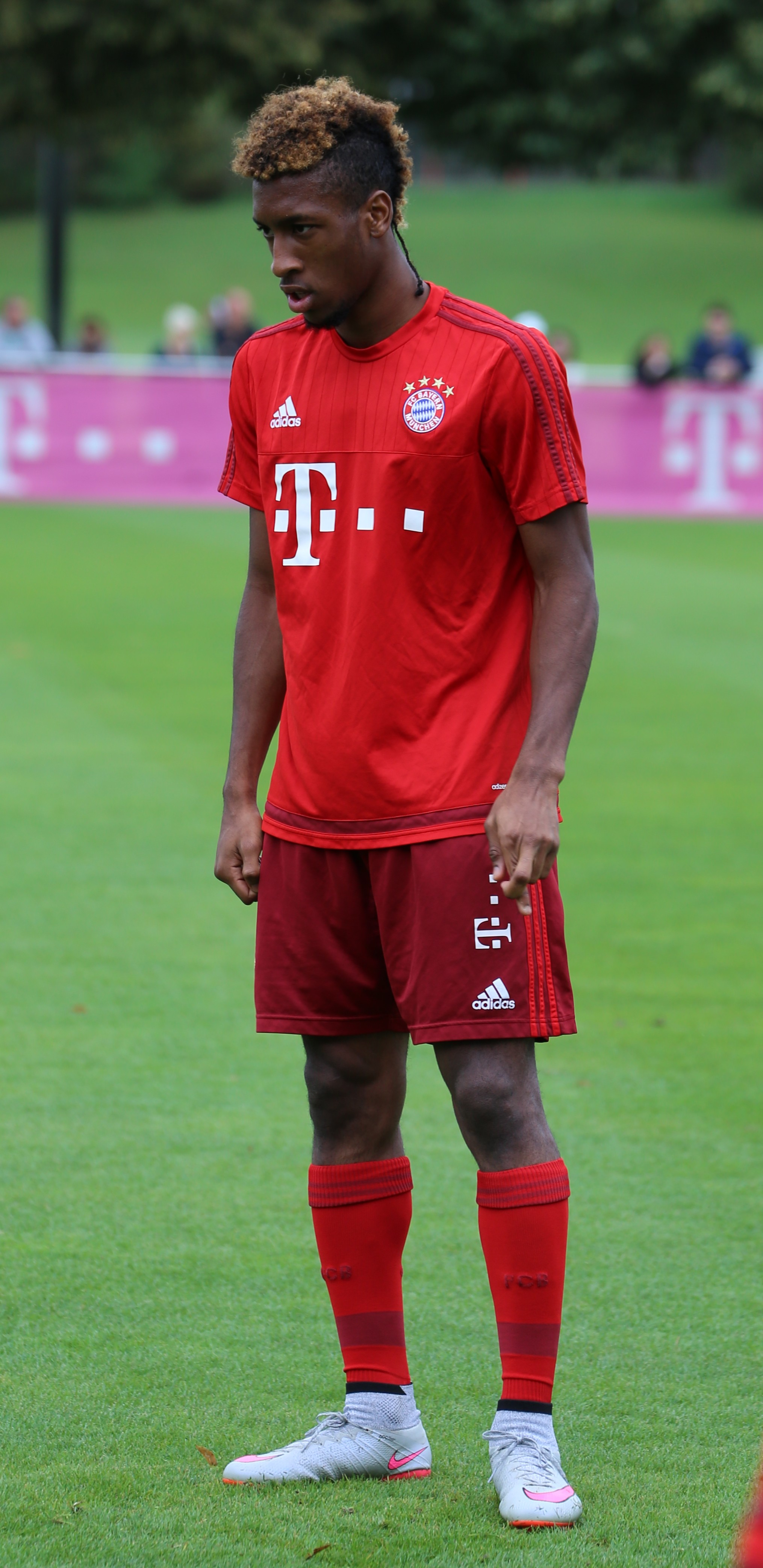 Kingsley Coman beim Training auf dem Gelände des FC Bayern München